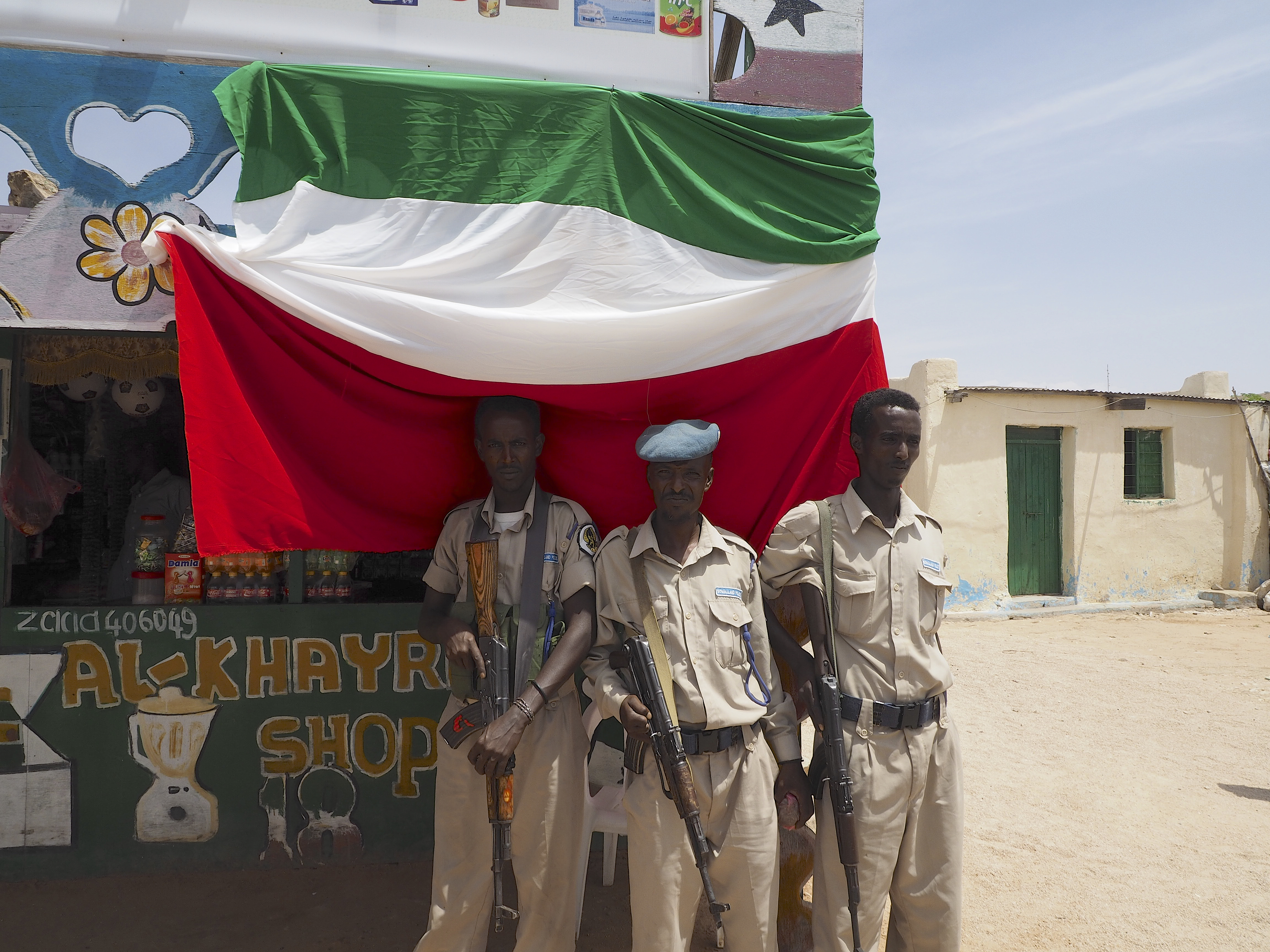 Our groups escorts